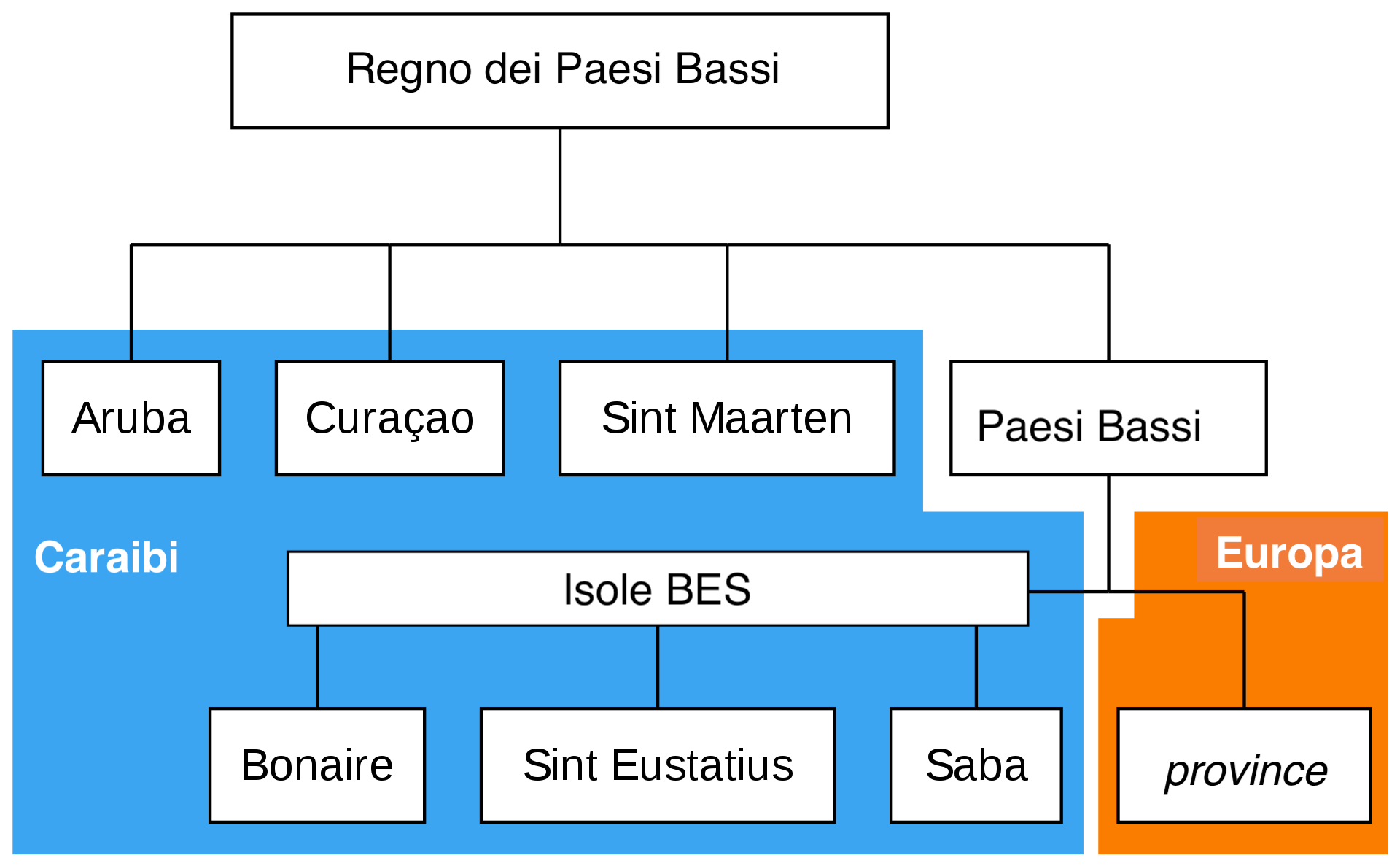 Struttura ad albero delle suddivisioni del Regno dei Paesi Bassi, che mostra la posizione geografica delle diverse parti.